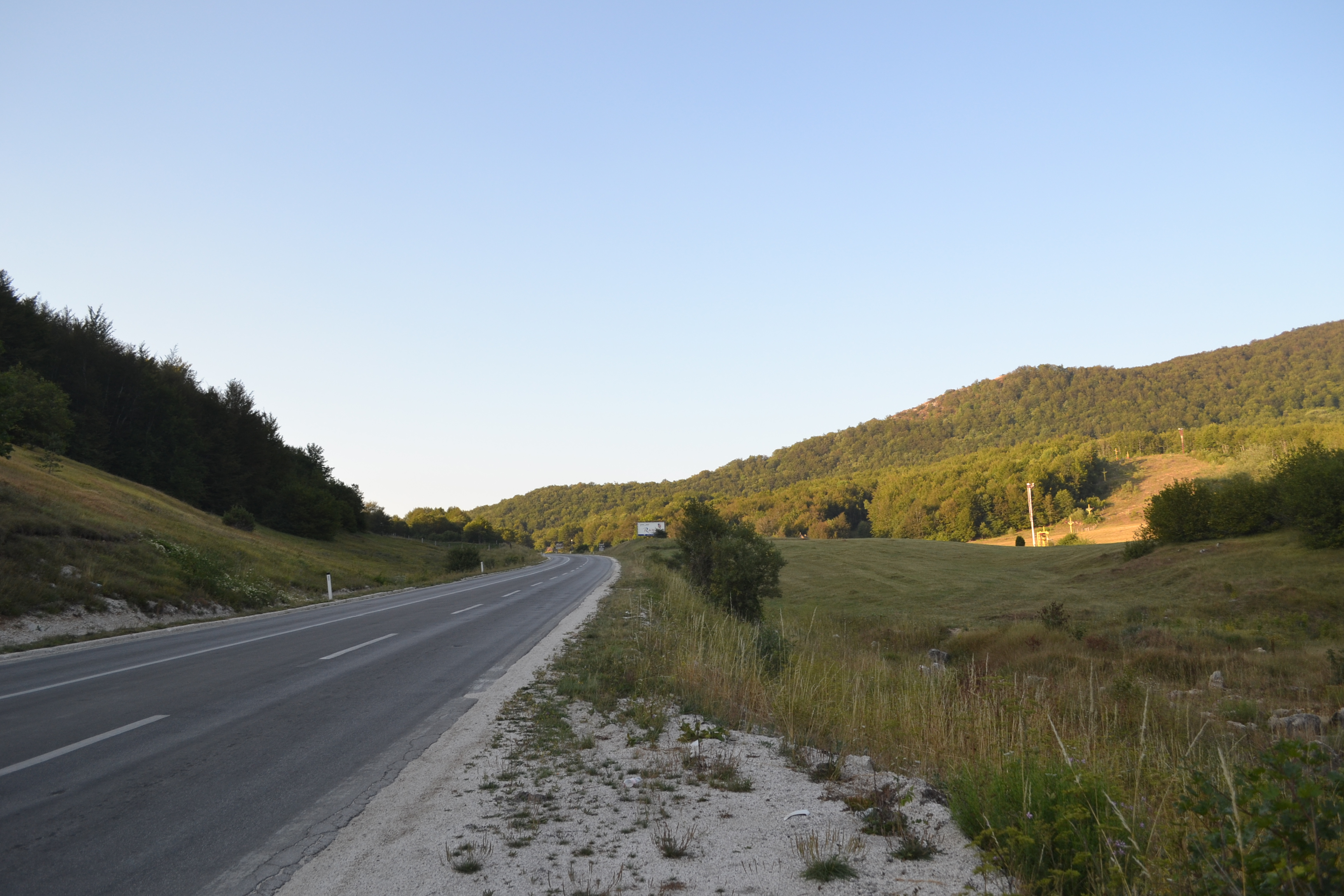 Успон на путни превој Макљен између Горњег Вакуфа и Прозора